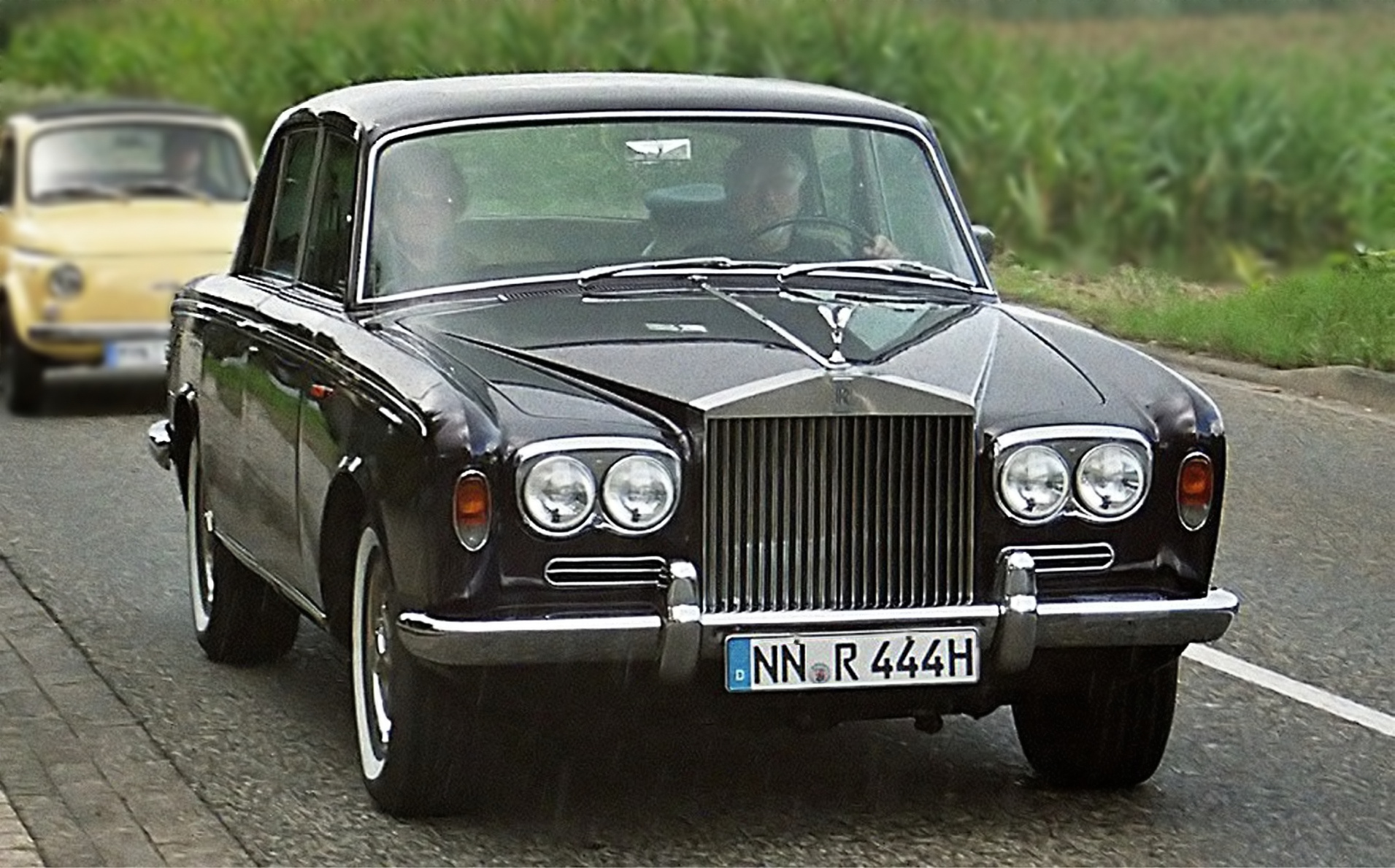 Rolls-Royce Silver Shadow I, Baujahr 1967